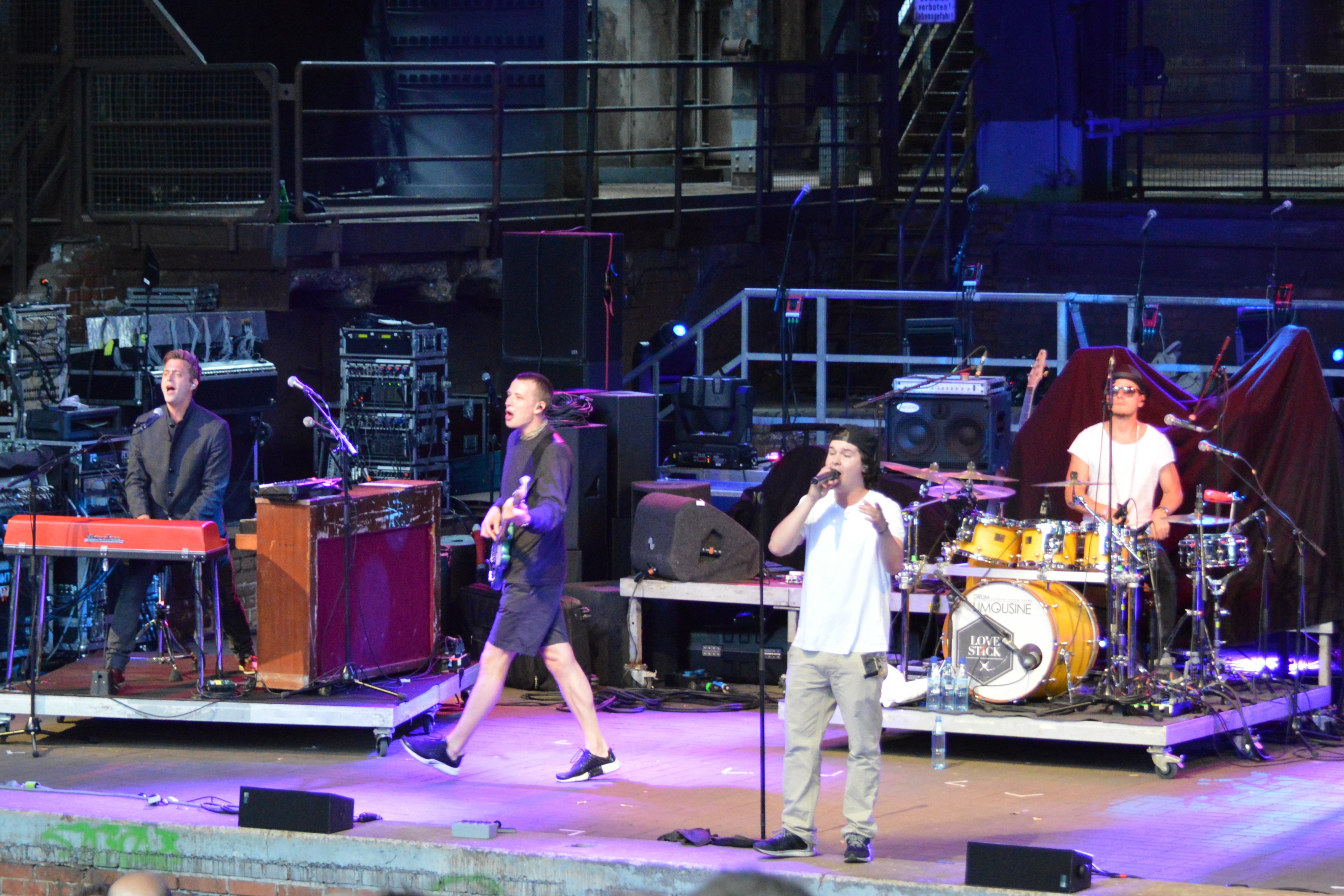 Lukas Graham beim Traumzeit-Festival 2013